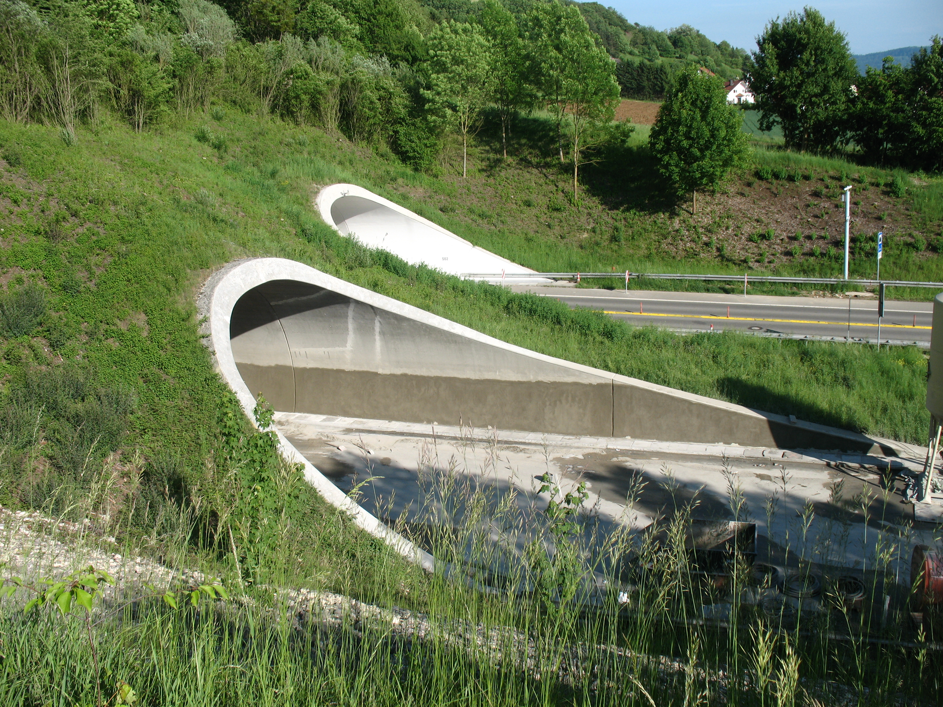 Die beiden Röhren des Hohentwiel-Tunnels im Südwesten während Baumaßnahmen 2008-2009